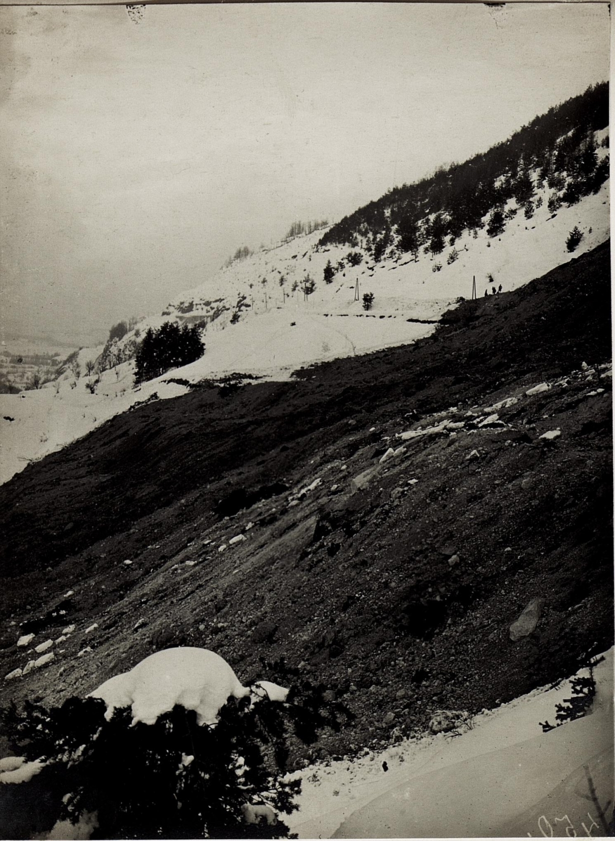 Panorama vom Bergsturz im Fleimstal.